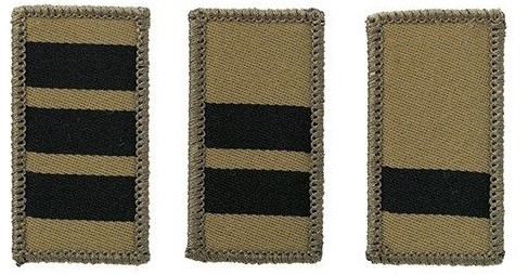 Grade Zivilschutz Kdo